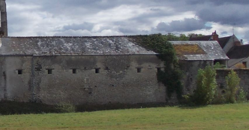 Prieuré du Louroux.